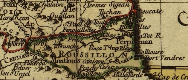 Rosellón, map 1745 - cropping from Image:Philippe Buache Carte de France divisee suivant les quatres departements de Messieurs les secretaires dEtat 07710637.jpg